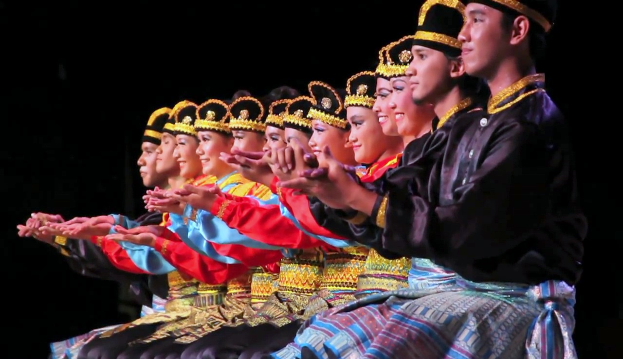 Actuación del grupo indonesio KFT en el Festival Folclórico Internacional de Jaca (España), en 2012